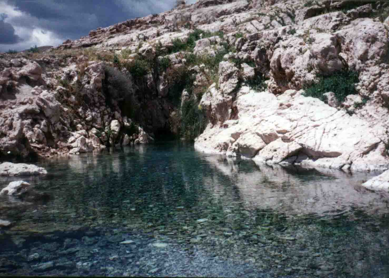 چشمه سرچشمه، دهانه دوم